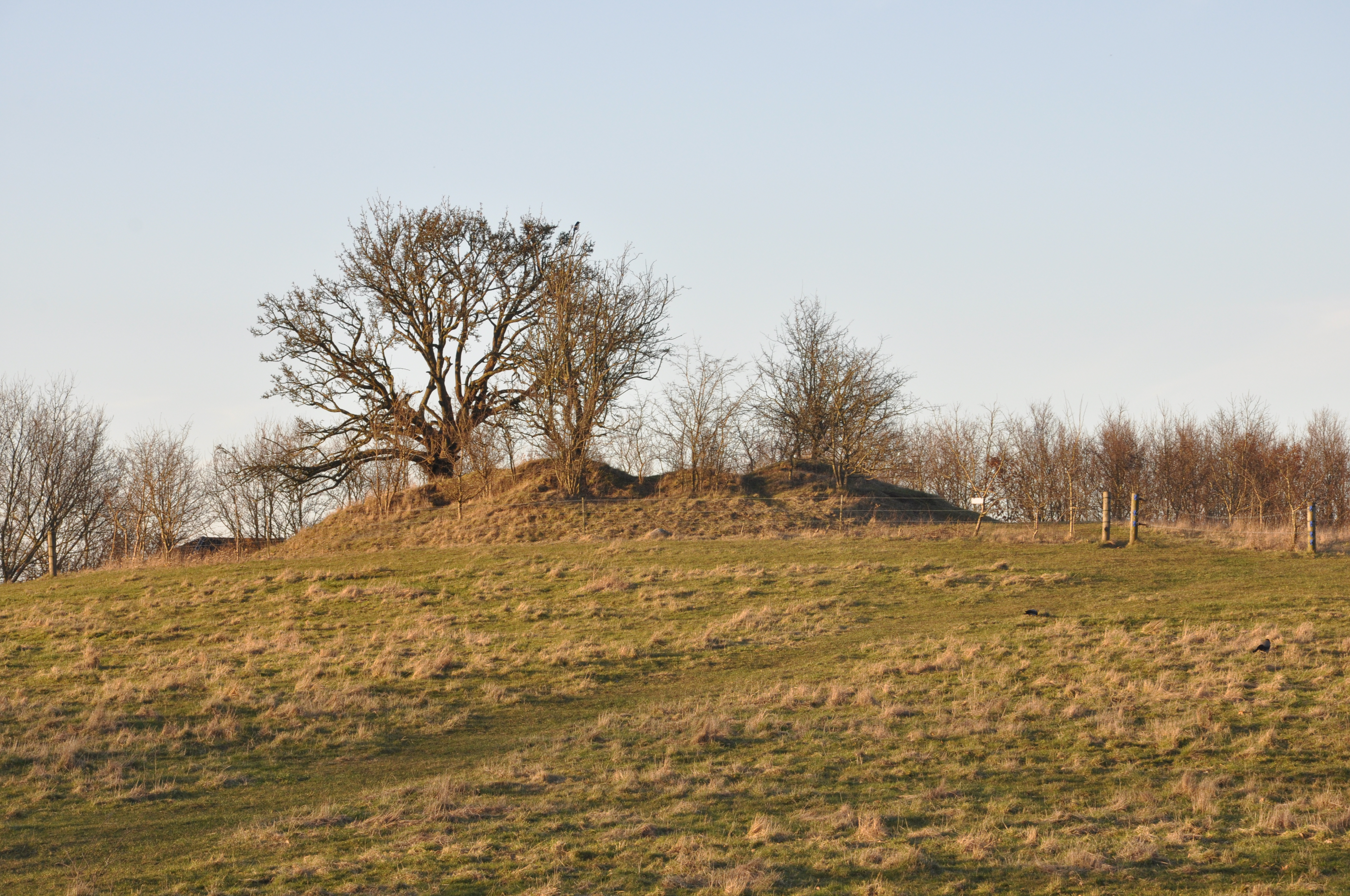 Låenhøj ved Hyrdehøj Skov